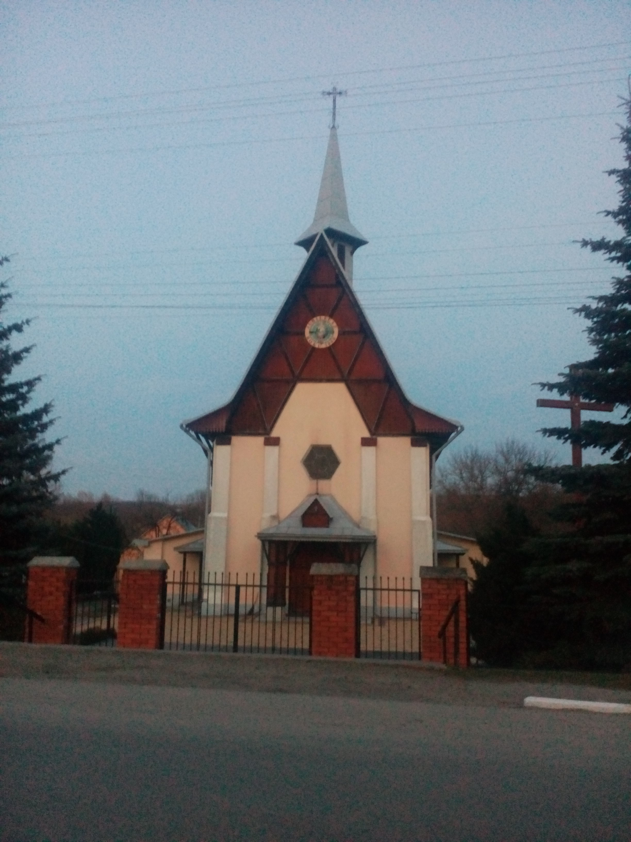 костел